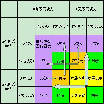 刘慈欣“黑暗森林理论”示意图，描述了在“单次博弈囚徒困境下”宇宙中两个相遇文明所必然爆发的冲突